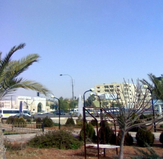 المدخل الأمامي لكلية الزرقاء الحكومية.